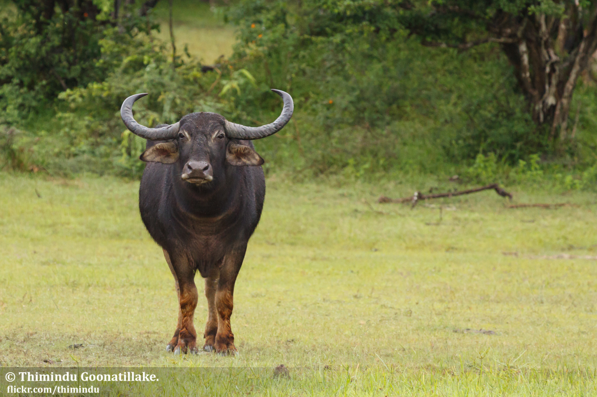 Feral water buffalo, Kumana National Park, Sri Lanka